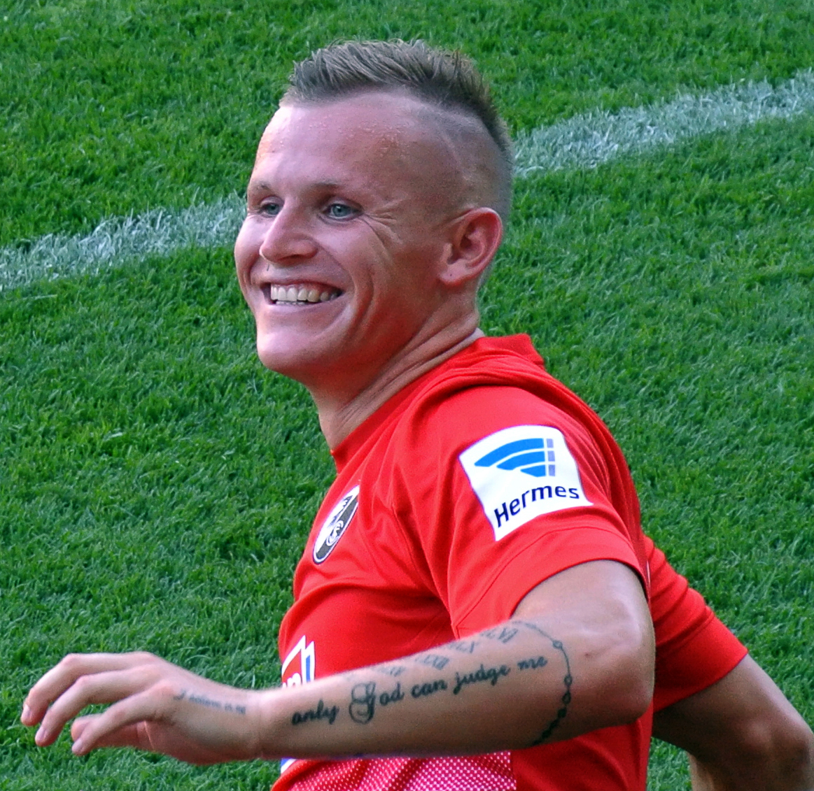 Jonathan Schmid nach dem Saisonseröffnungsspiel des SC Freiburg gegen Athletico Bilbao am 27. Juli 2013